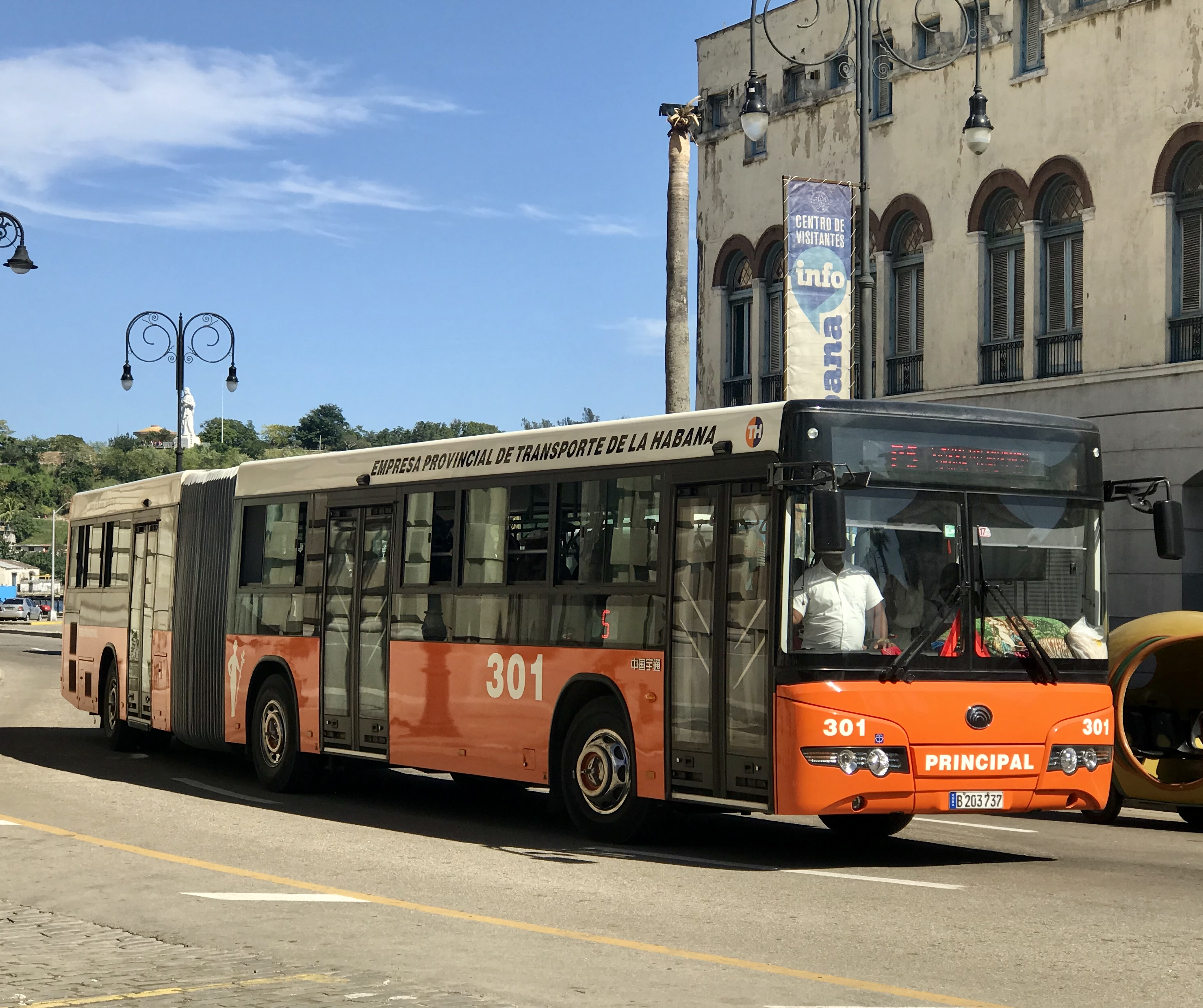 Ruta P5 de la Empresa Provincial de Transporte de La Habana